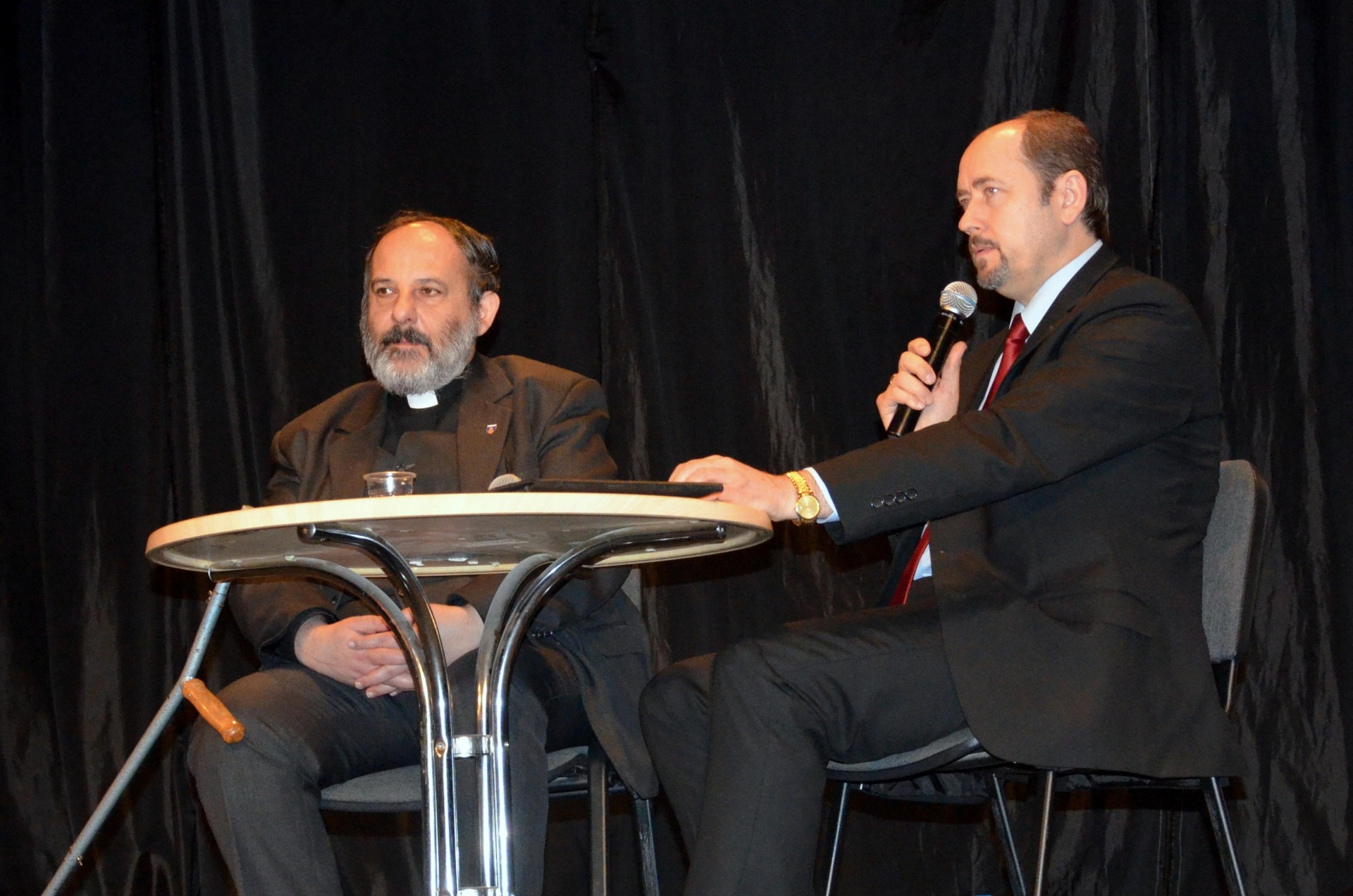 Treffen mit Pfarrer Tadeusz Isakowicz-Zaleski